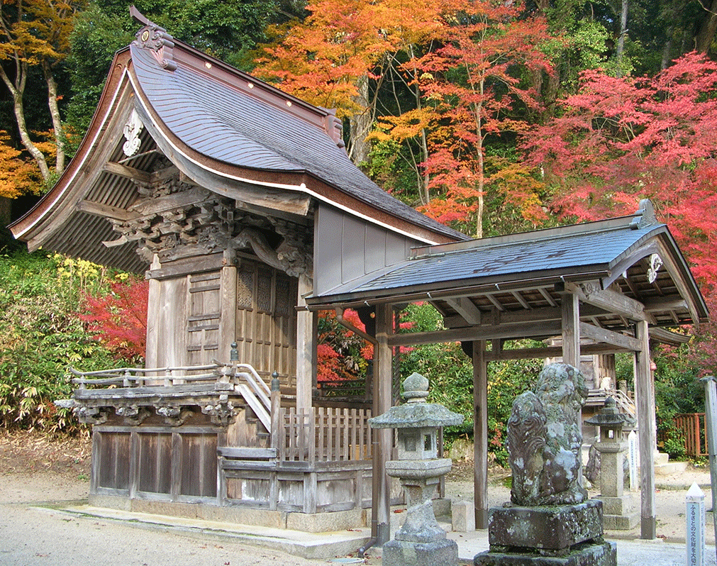 山王宮境内、本殿横にある摂社・杉末神社